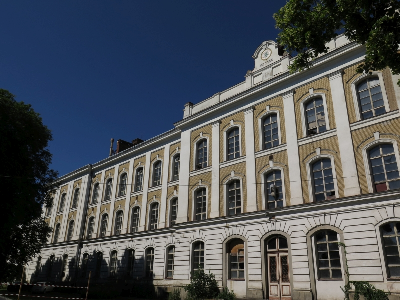 Tabáková továrna, T. G. Masaryka 715, 787, 788, 789, Tachov.